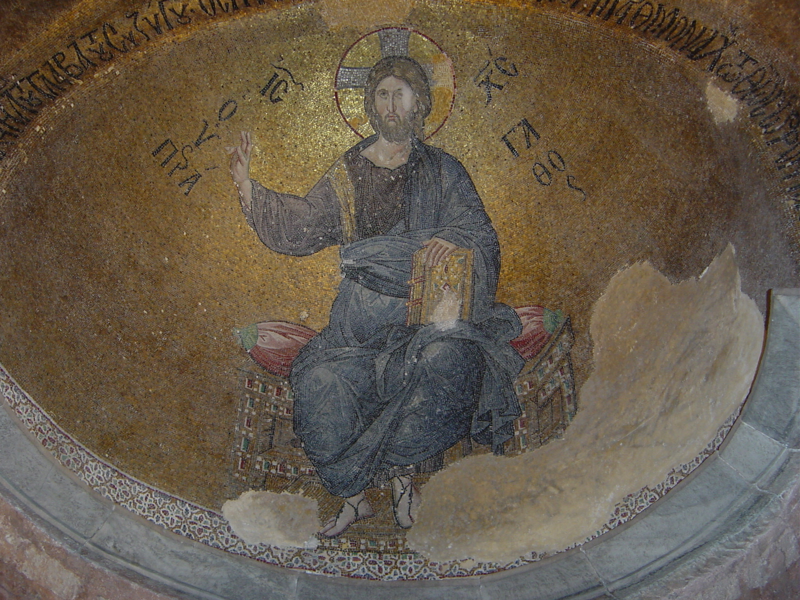 Istanbul: Museo dell'ex chiesa del Pammacaristos (Fetiye camii). Cupola con mosaico bizantino del Cristo pantocratore. Foto di: Giovanni Dall'Orto, 26-5-2006.